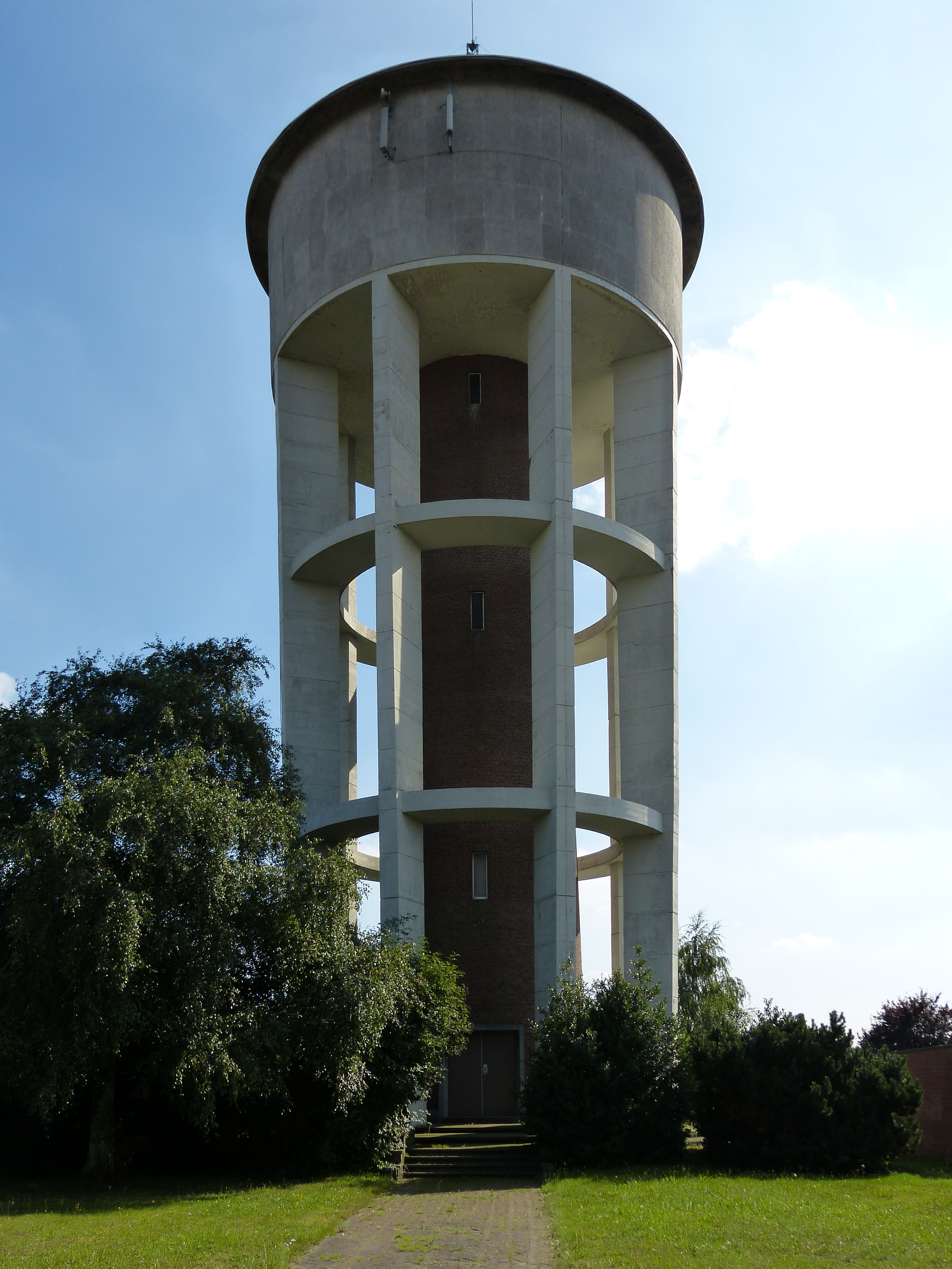 Nijlen G Gezellestraat Watertoren